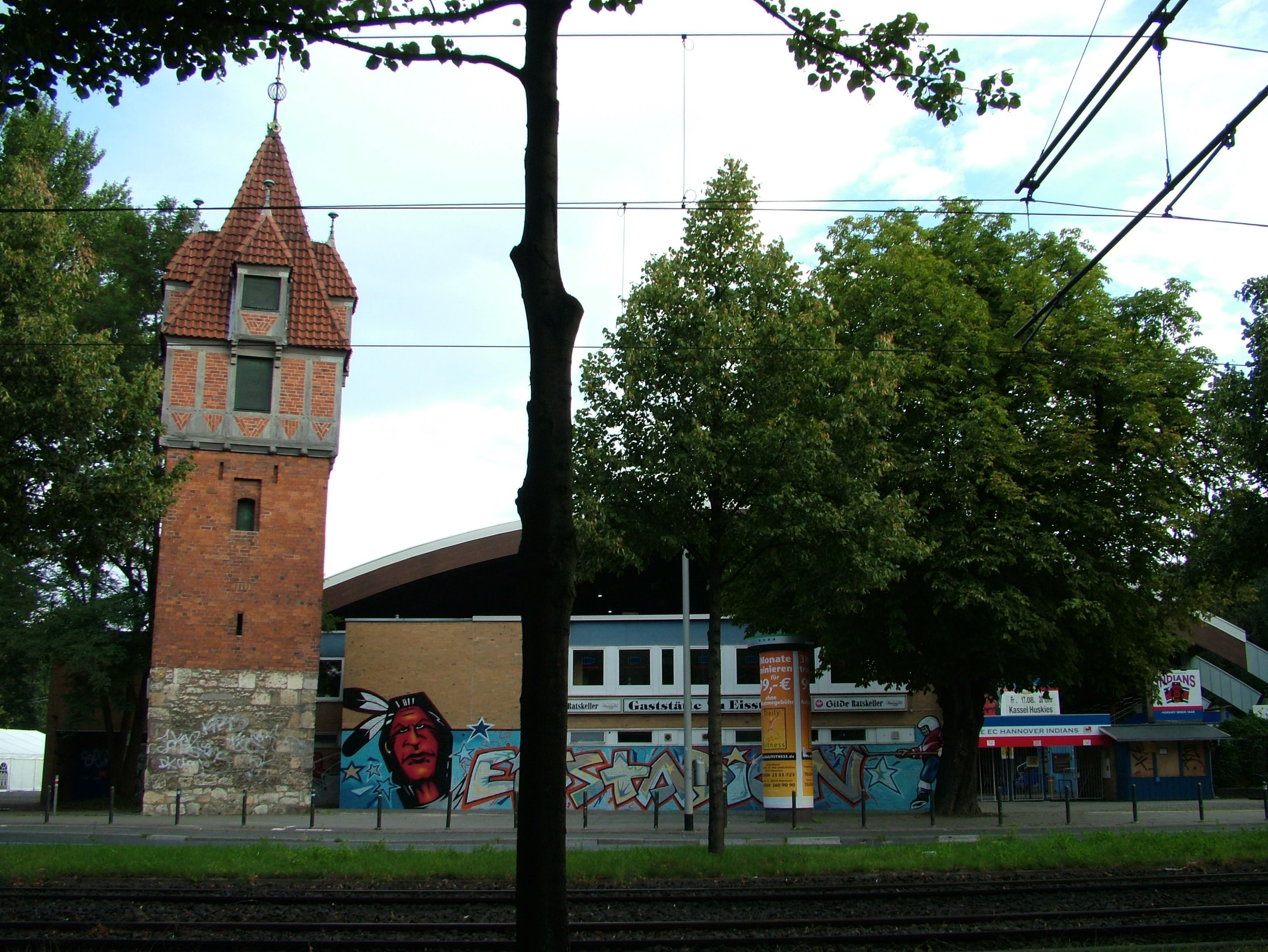 Hannover, Pferdeturm mit Eishockey-Stadion